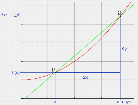 Sekantlinje-bild från Secant. Ritad av —Sverdrup(d) i xpaint.